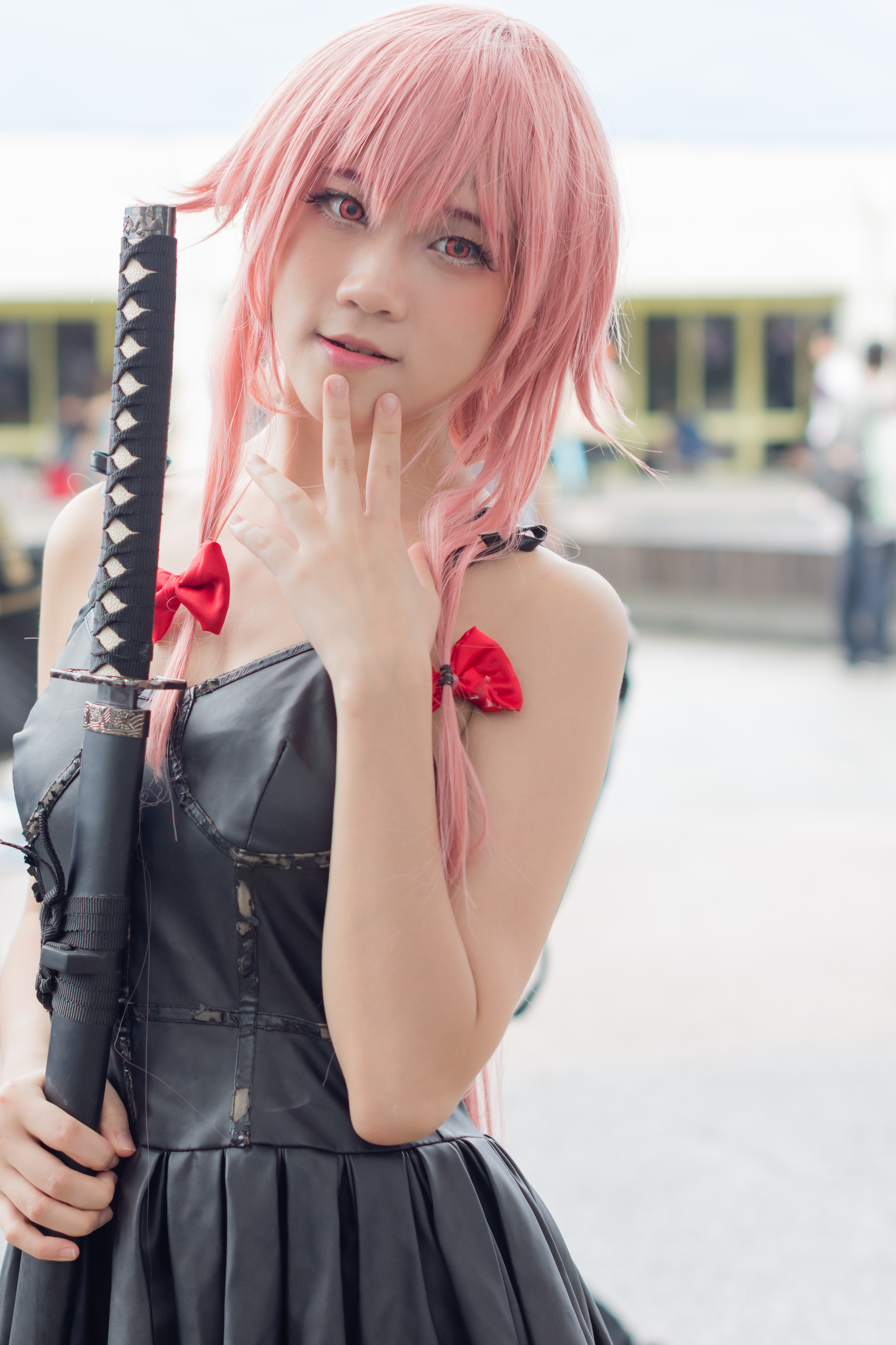 第30屆開拓動漫祭，《未來日記》我妻由乃cosplayer。